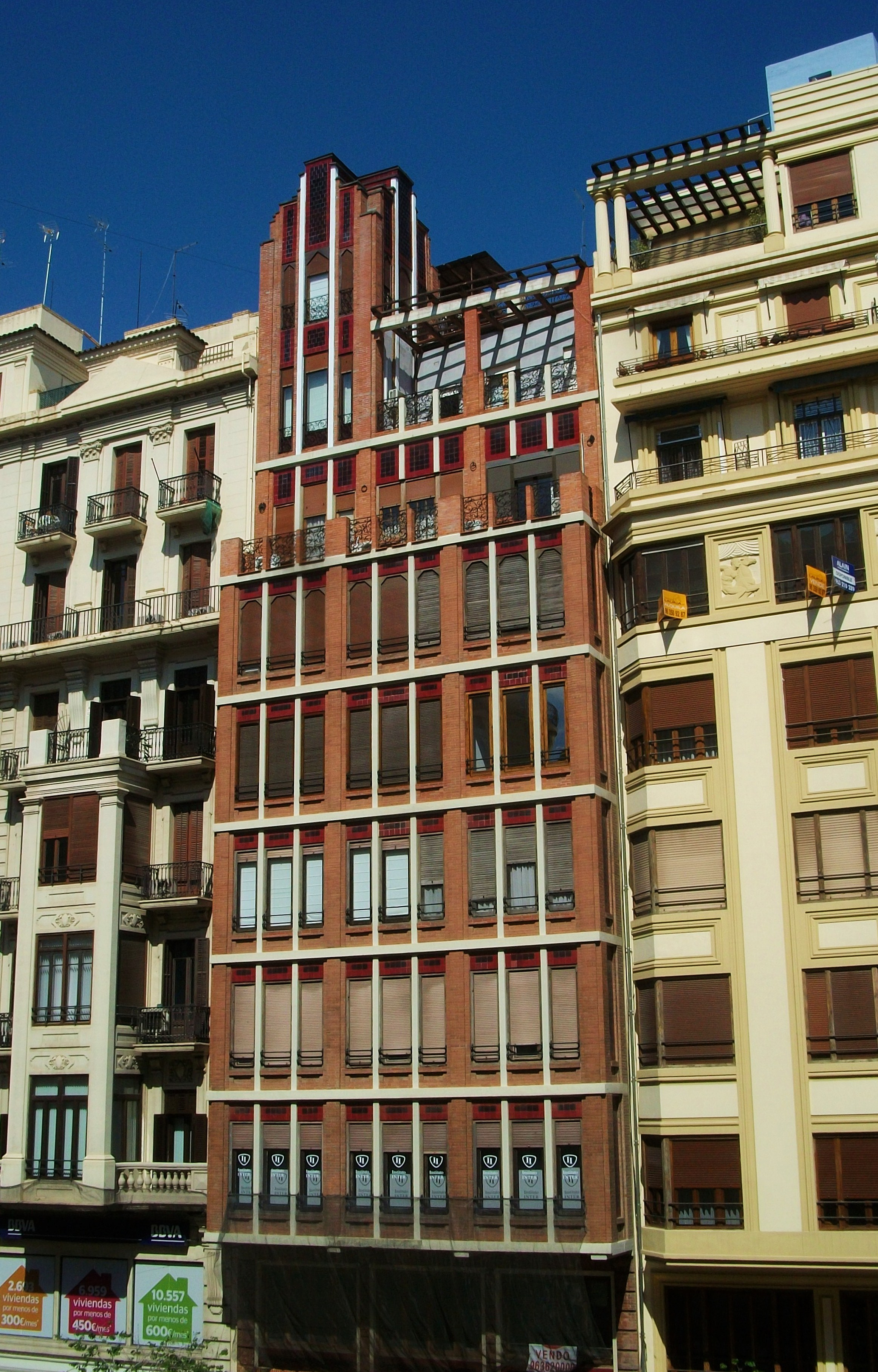 Edifici Cervera, de l'arquitecte Joaquín Rieta Síster i construït en 1931. Plaça de l'Ajuntament de València.